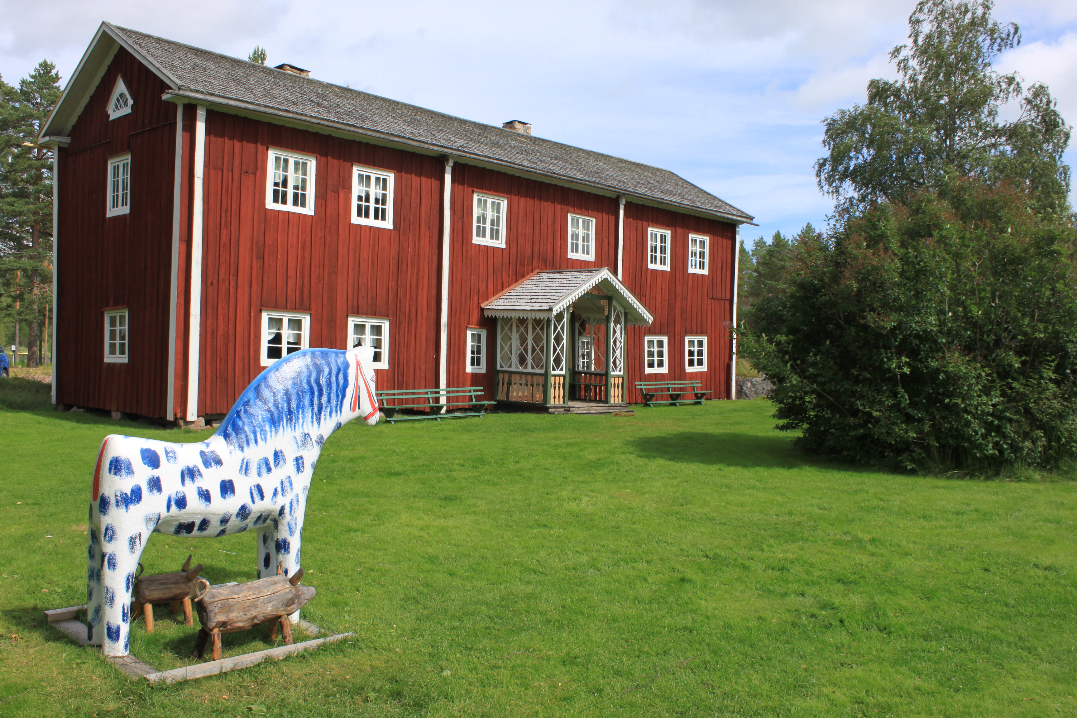 Framsidan av Fågelsjö Gammelgård med trähästen.